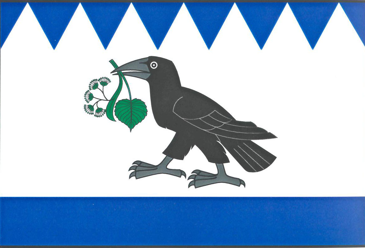 Vlajka obce Víska (okres Havlíčkův Brod)